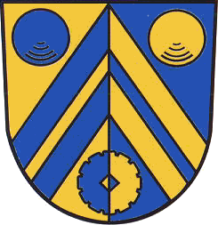 Wappen der Gemeinde Ballhausen